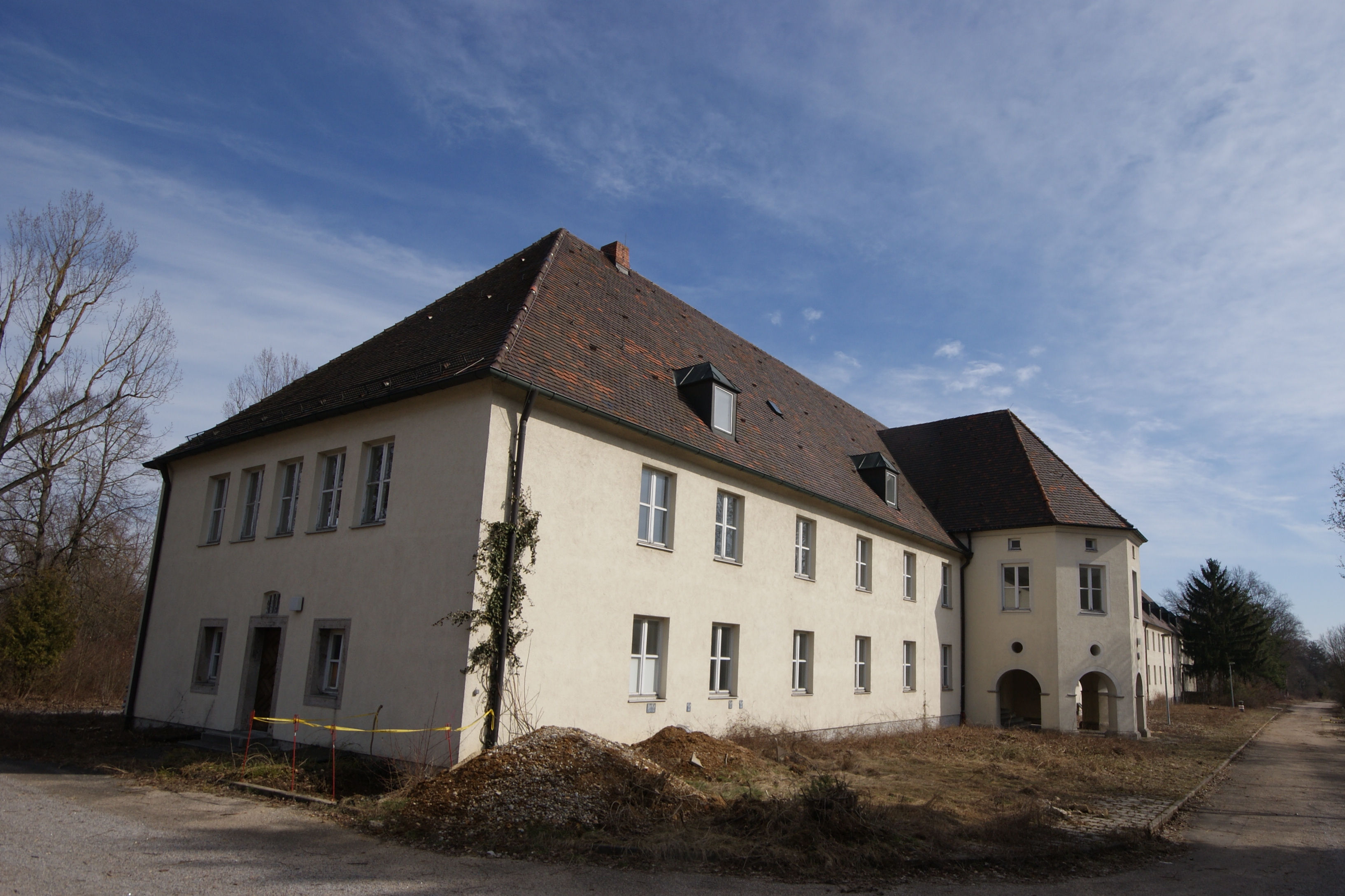 Nibelungenkaserne Regensburg, Teilgebäude 1 des großen Schlangenbaus, mittlerweile abgebrochen.